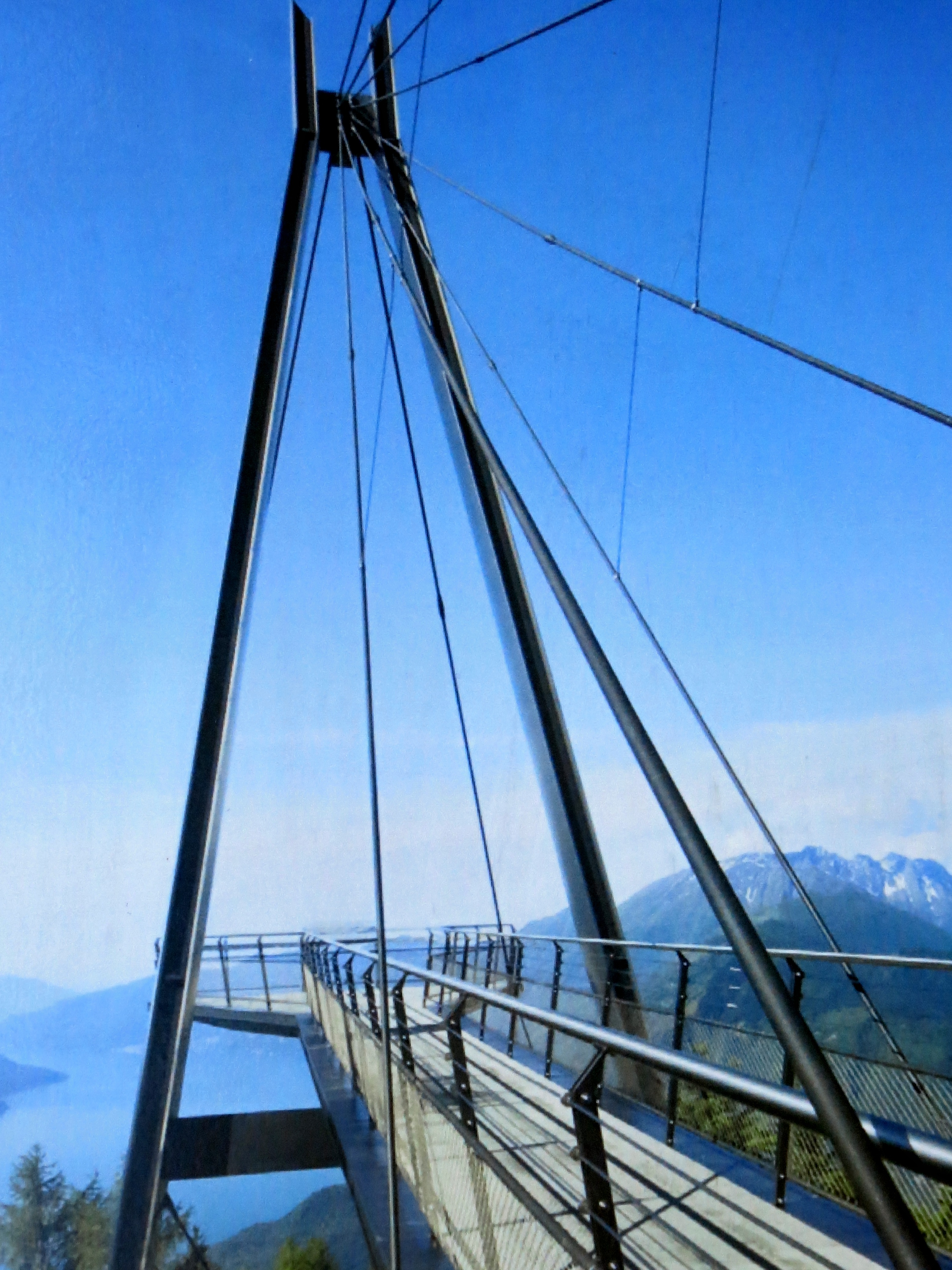 Plattform Cardada